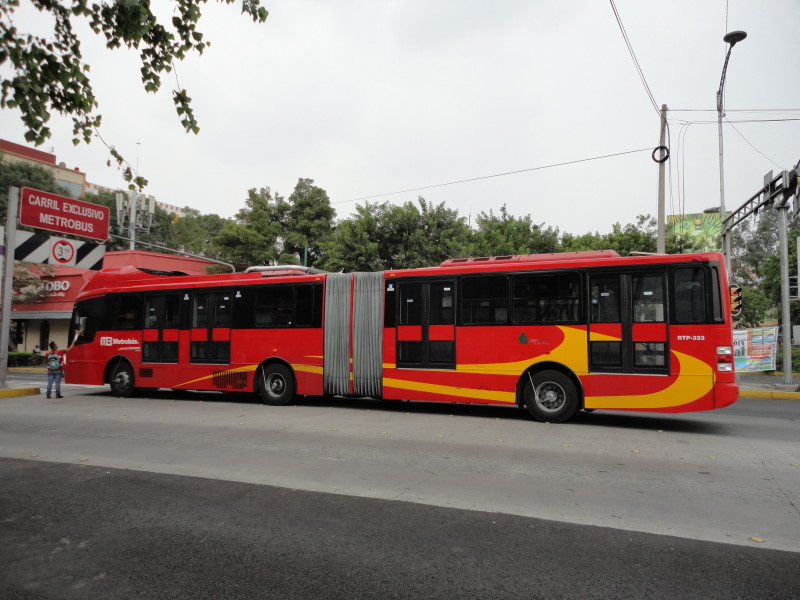 Uno de los autobuses articulados que opera RTP en el Sistema Metrobús